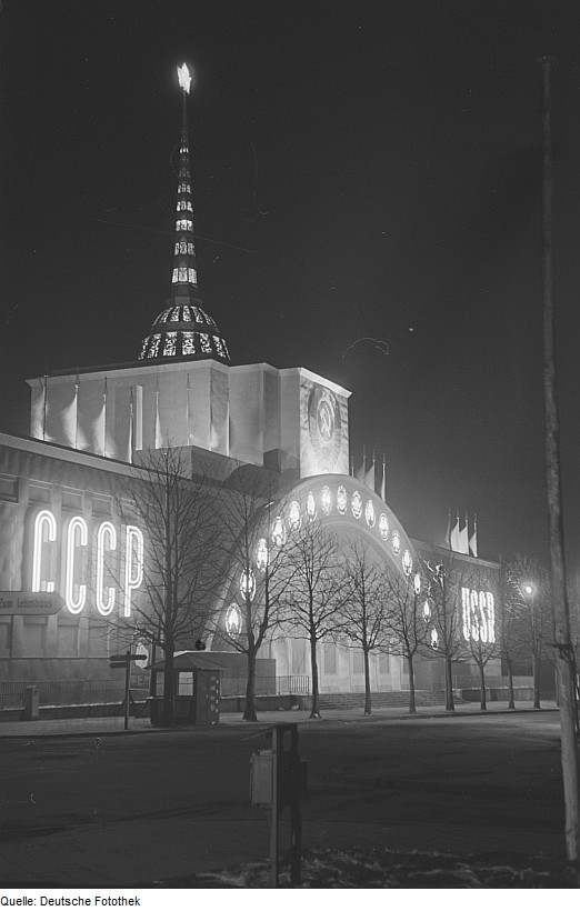 Original image description from the Deutsche FotothekNachtansicht des Sowjetischen Pavillons